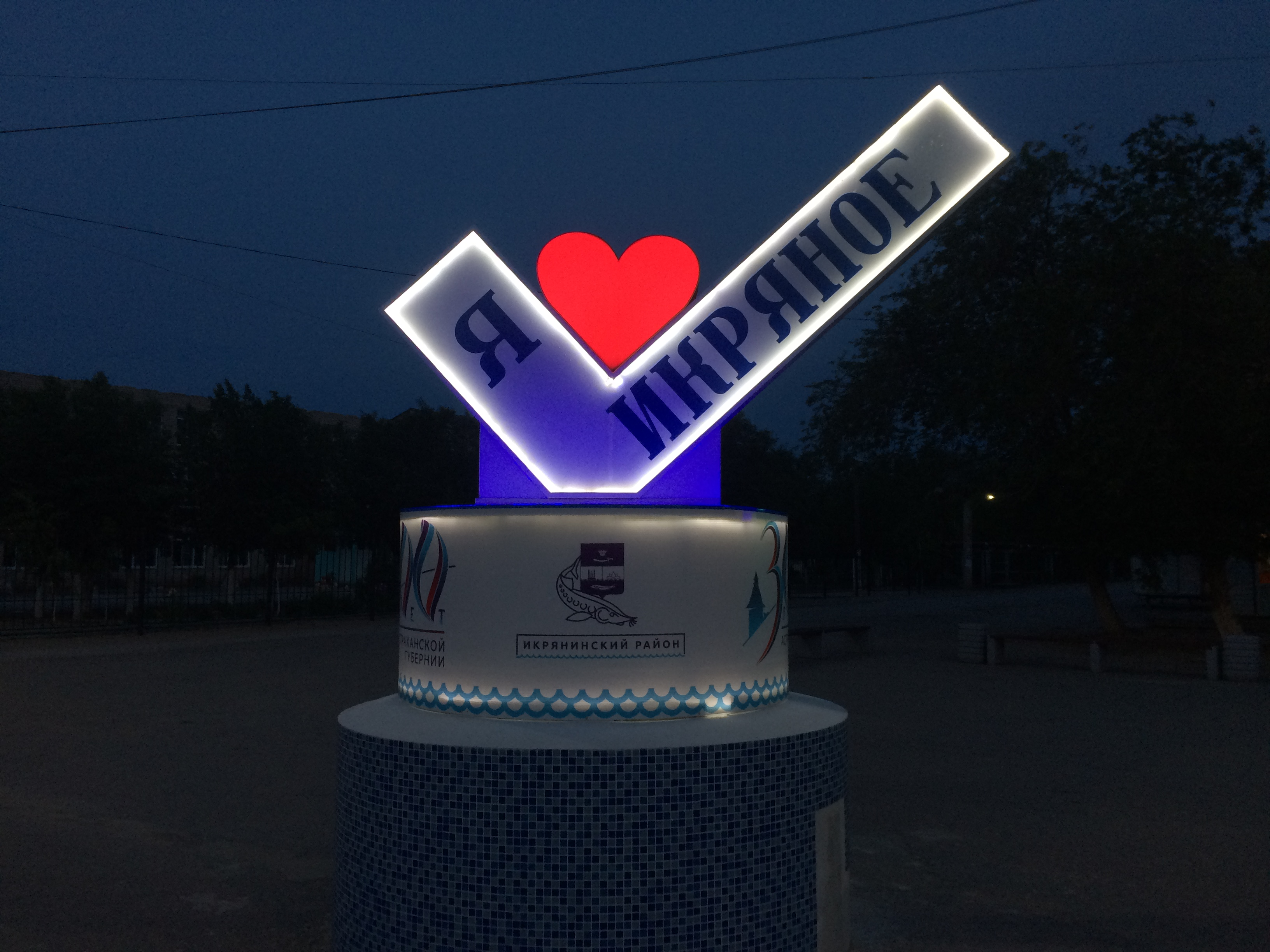 Знак в селе Икряное.